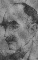 Arkitekten Georges Ludvig Robert von Dardel